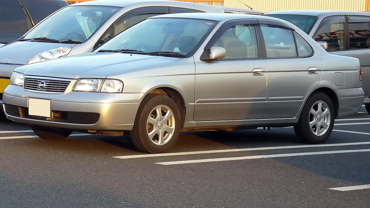 日産・サニー（B15型・後期）